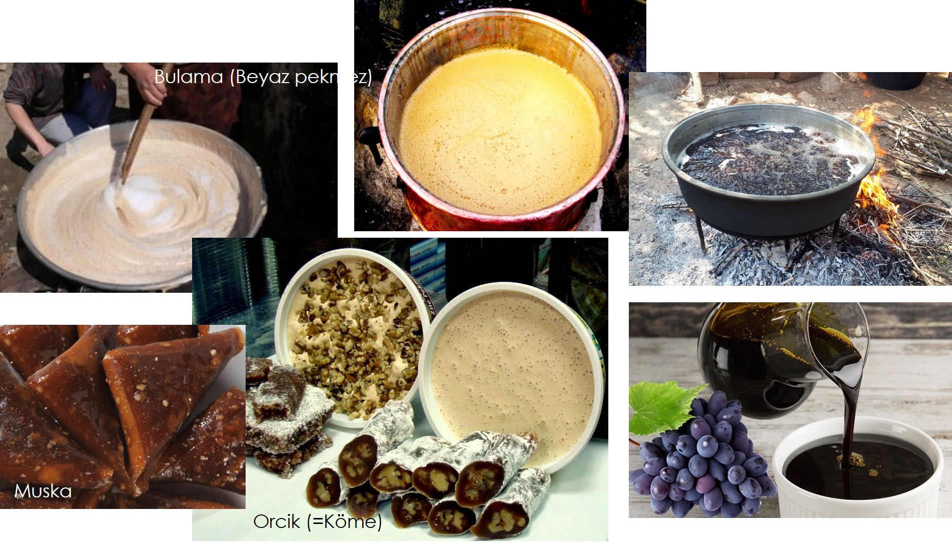 üzüm ürünleri